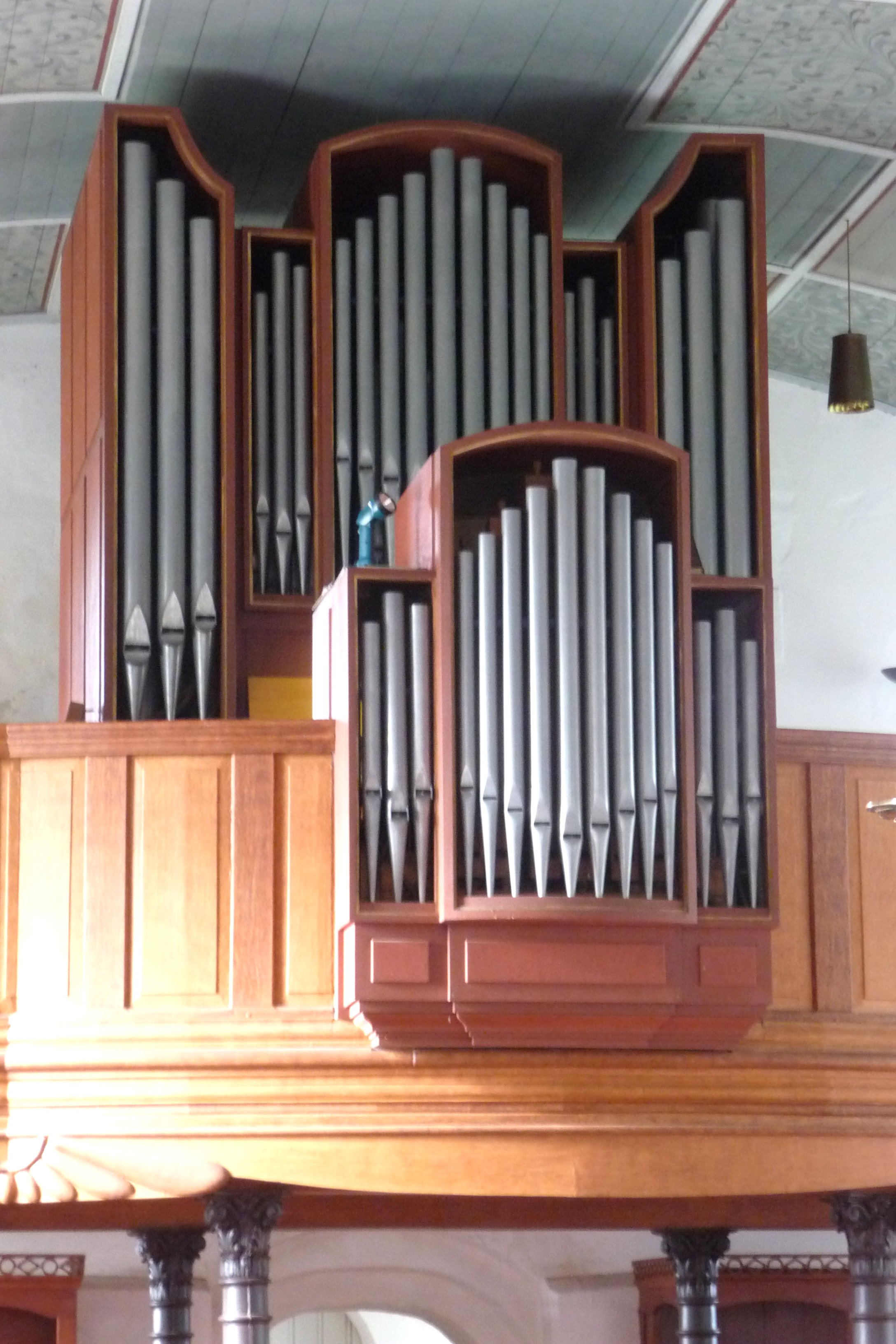 Orgel in der ev.-luth. Paulus-Kirche Filsum